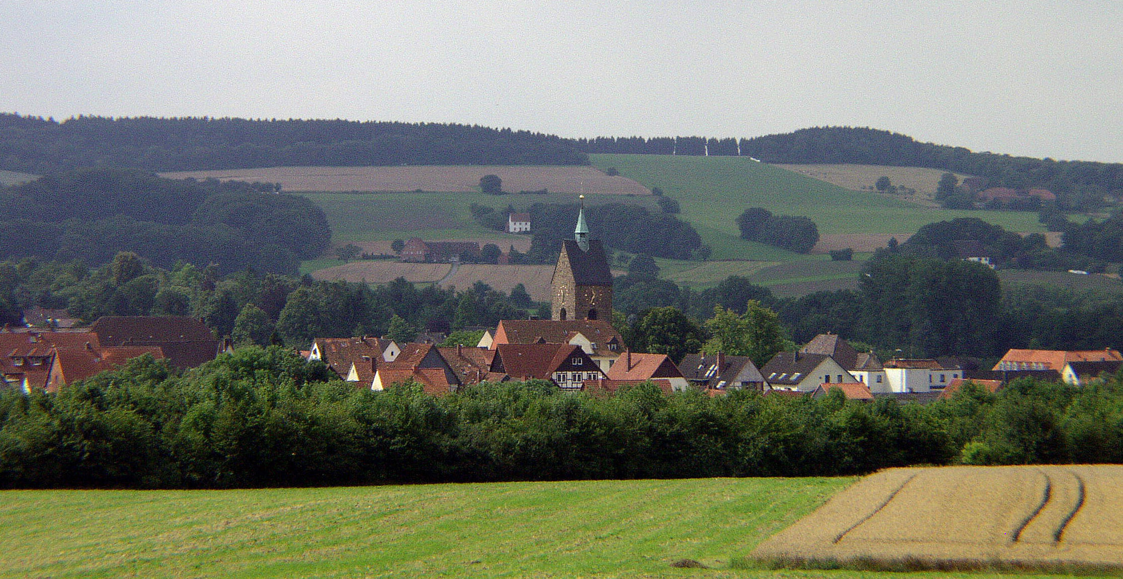 Blick auf Bösingfeld, Extertal, Nordrhein-Westfalen, Deutschland. In der Bildmitte die Pfarrkirche.